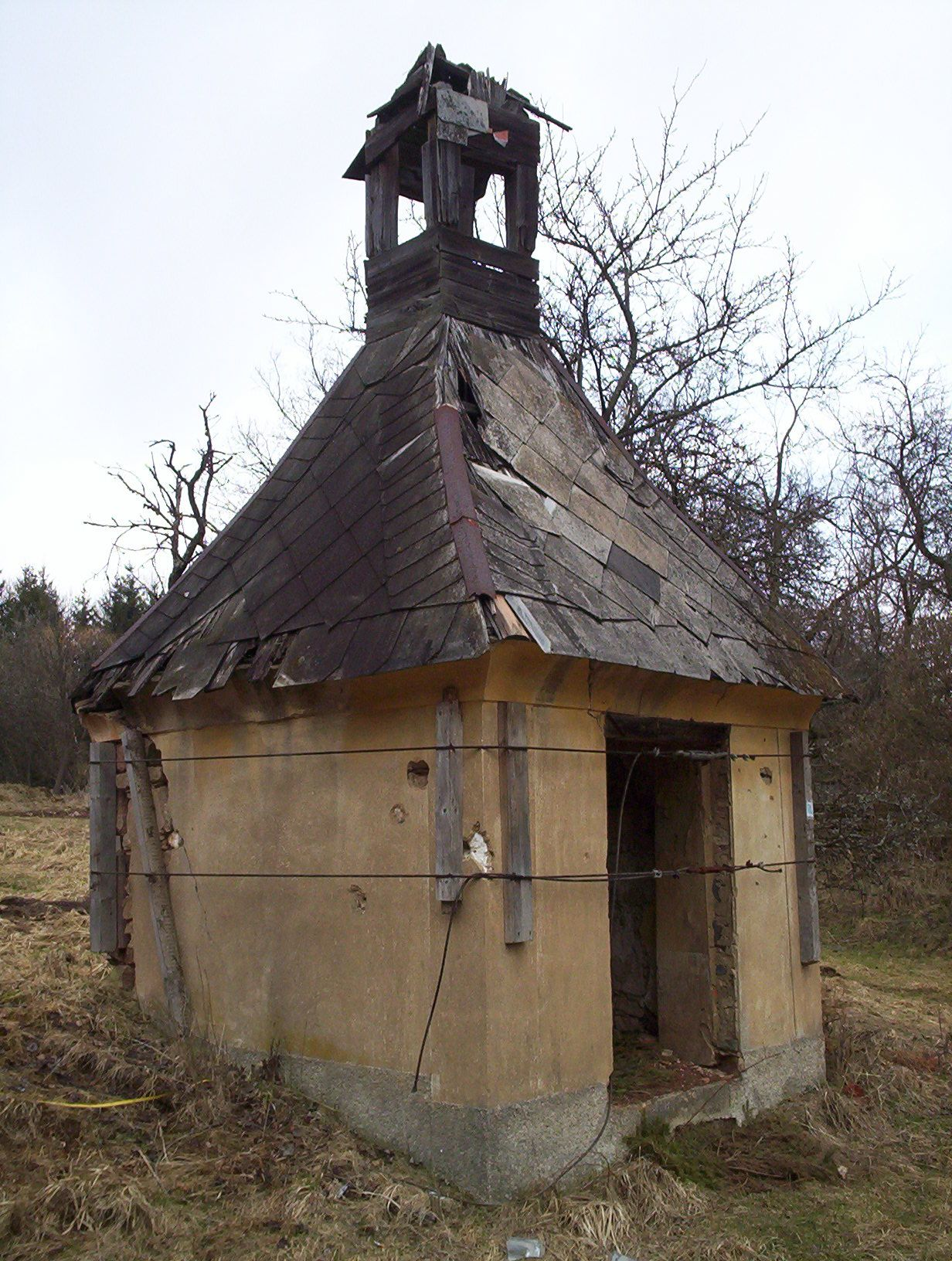 kaplička Umíř (okres Plzeň-sever)